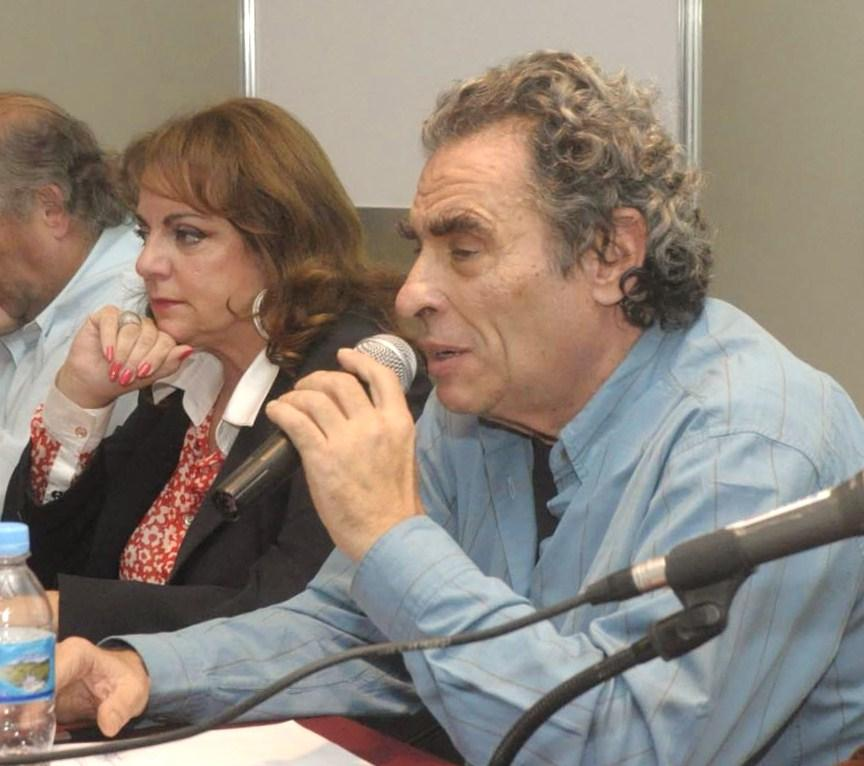 En la 39.º Feria Internacional del Libro (en Buenos Aires), el 30 de septiembre de 2011 presentamos la charla «40.30.10 - Héctor Cámpora, Raúl Alfonsín y Néstor Kirchner: los puentes de la democracia». Participamos de la charla junto a Nilda Garré (ministra de Seguridad de la Nación), Leopoldo Moreau (legislador UCR), Eduardo Jozami (economista y actual director del Centro Cultural de la Memoria Haroldo Conti), y la coordinación de María Seoane (directora del Centro Cultural Caras y Caretas).